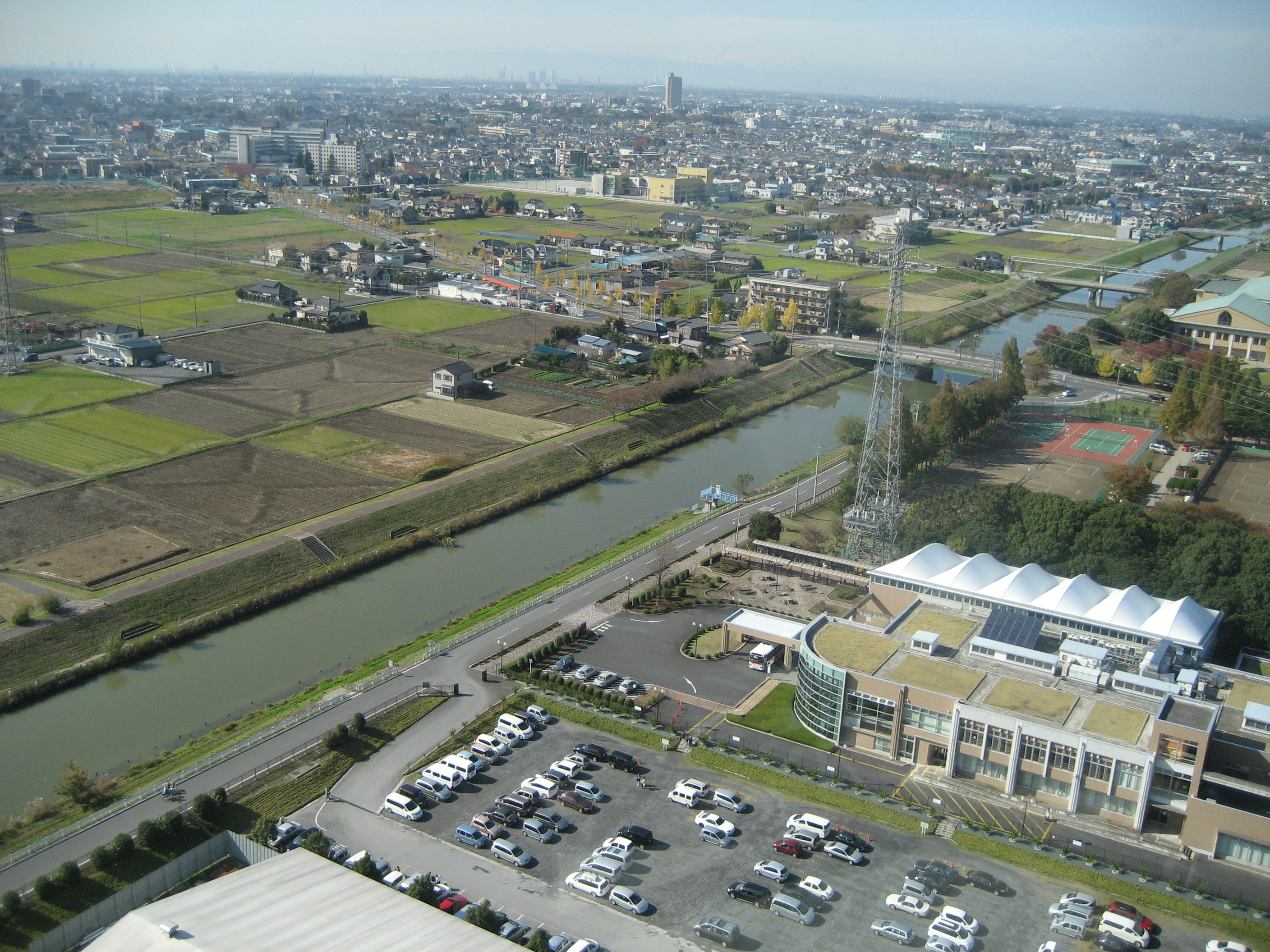 新方川越谷市内東埼玉資源環境組合第一工場展望台より撮影